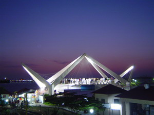 കൊച്ചി മറൈൻഡ്രൈവിലെ ഒരു കൊച്ചു പാലം. സമീപത്തുള്ള കുട്ടികളുടെ പാർക്കിൽ നിന്നും പകർത്തിയത്.